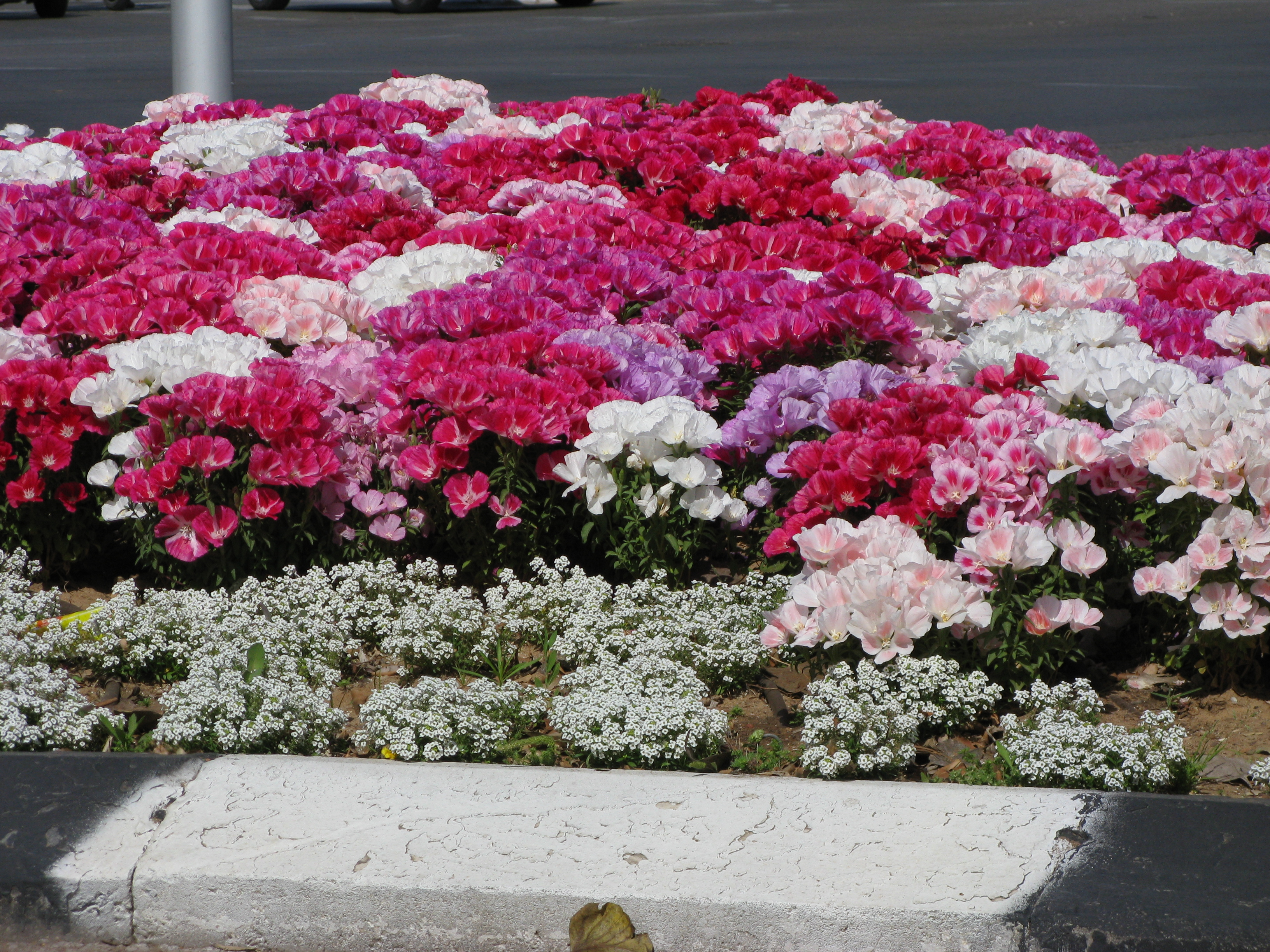 Raanana street flower beds